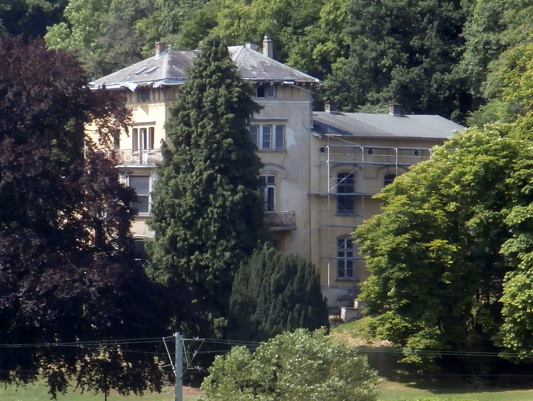 Haus Herresberg, Remagen: Ansicht vom anderen Rheinufer